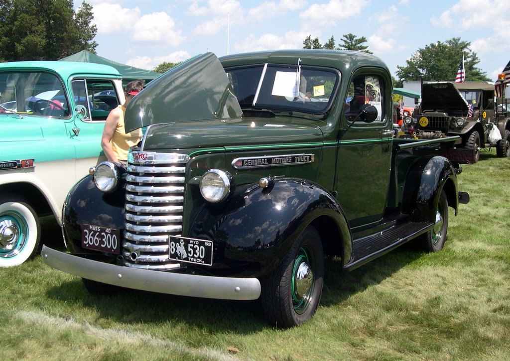 1940 GMC Truck